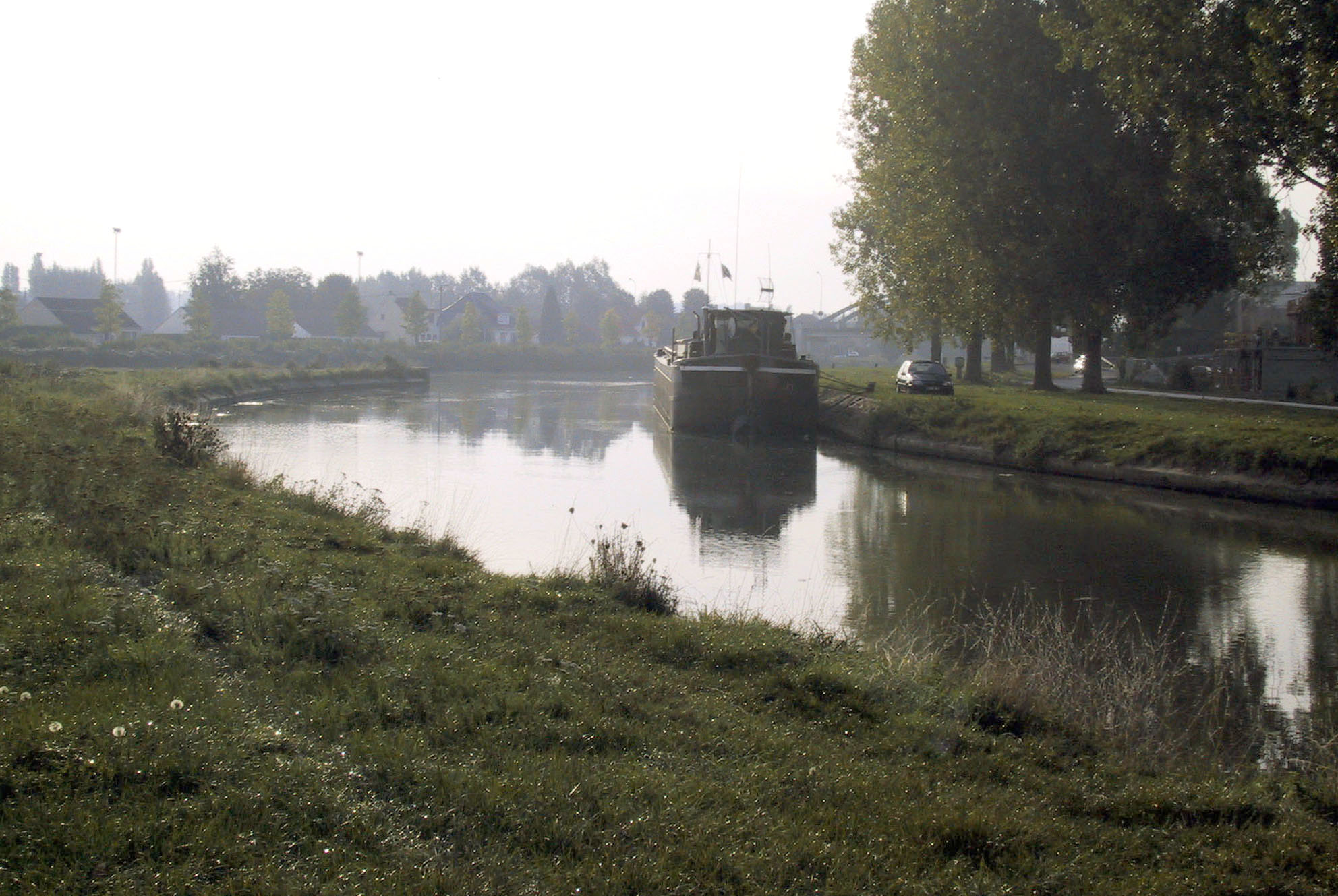 Dérivation du canal de Neufossé à Arques